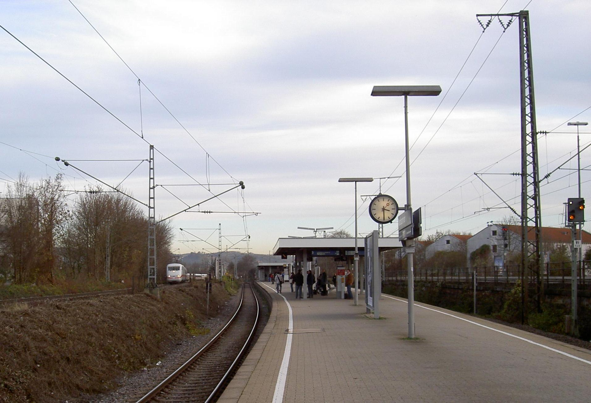 Haltepunkt Stuttgart Nord